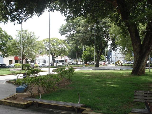 Interior da Praça André de Albuquerque em Natal, Rio Grande do Norte, Brasil.